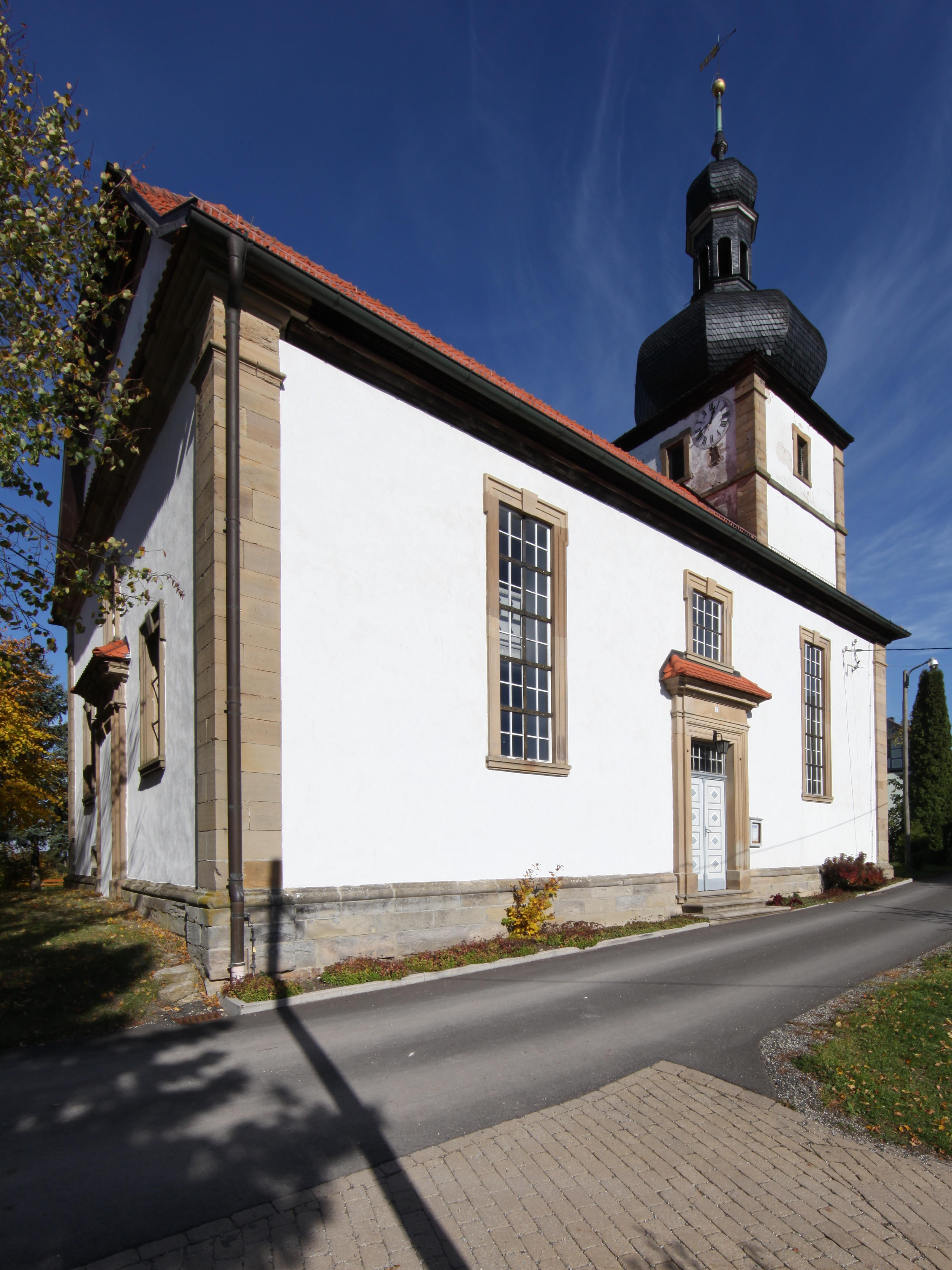 Schweickershausen-Ev-Kirche